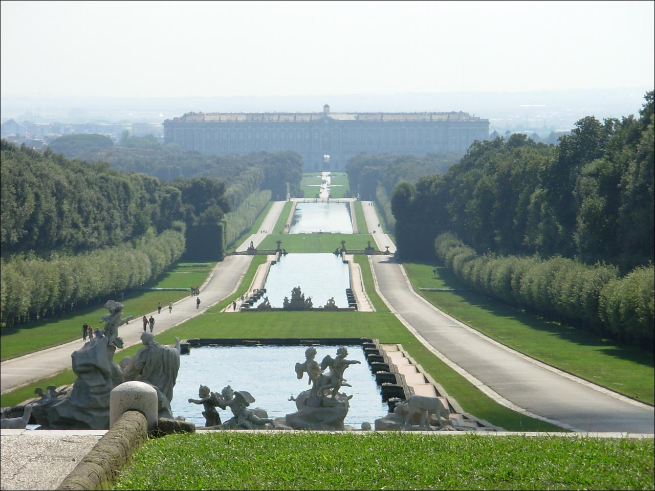 Der Königspalast von Caserta von Norden gesehen; im Vordergrund die Wasserbassins im Park